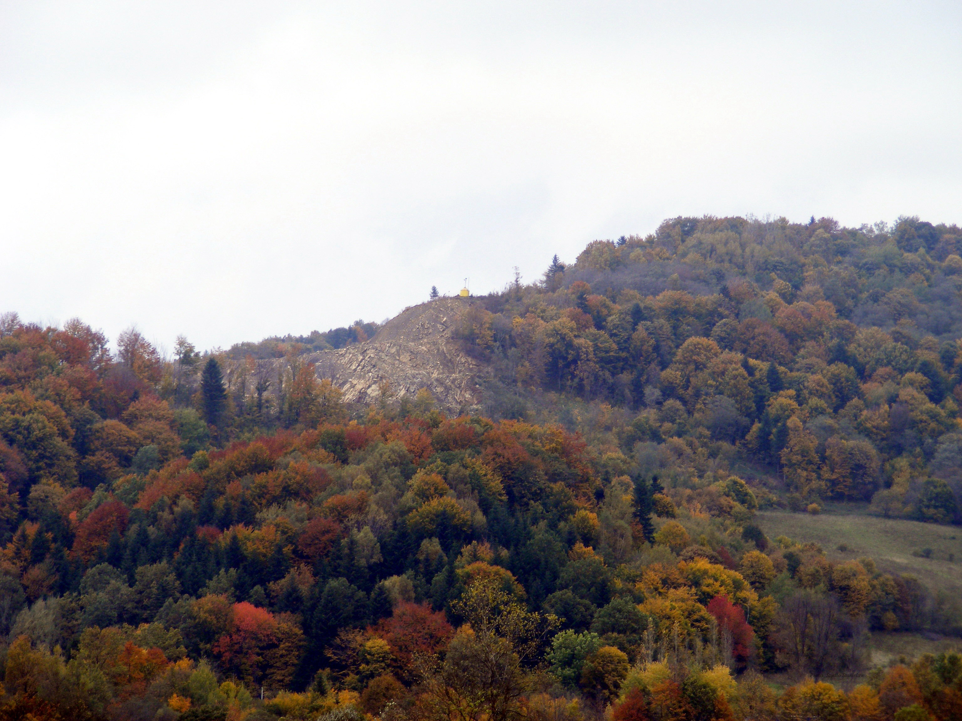 Kamieniołom w Lipowicy jesienią